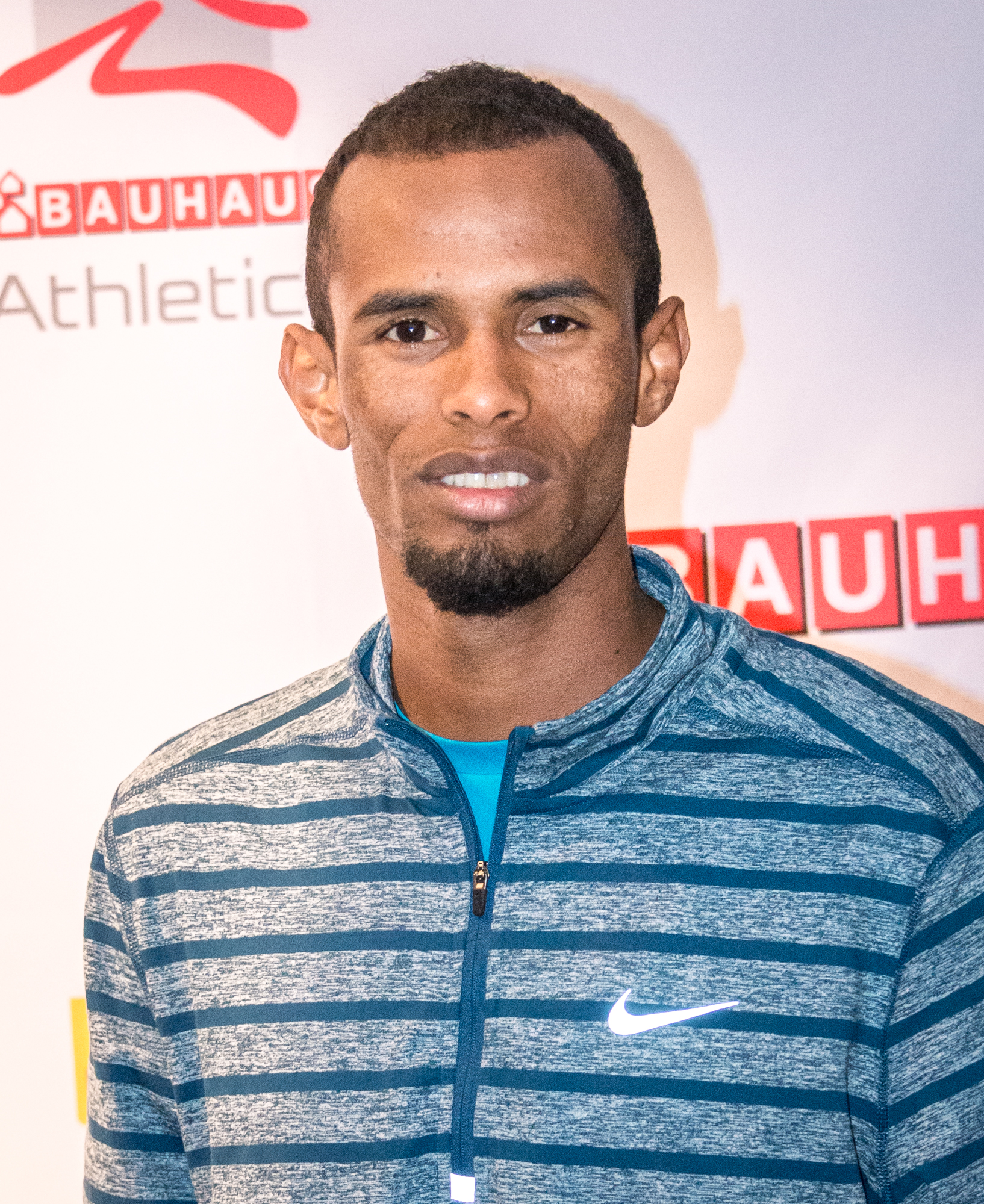 Ayanleh Souleiman inför Bauhaus-galan (Diamond League) i Stockholm 2015.